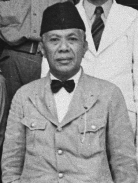 Madoera-Commissie. Te zien is o.a. de regent van Bangkalan: Cakraningrat/Tjakraningrat XII (1918-1945) met zijn zoon wrschl.Mr. R.A. Moh. Azis (Tjakraningrat XIII).